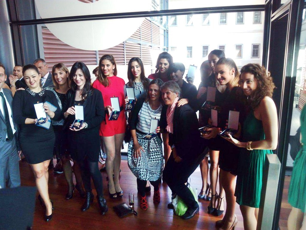 Las gimnastas del conjunto español de gimnasia rítmica campeón olímpico en Atlanta 1996 (las Niñas de Oro), el conjunto de 2015 y la periodista Paloma del Río, en la entrega de las Medallas y Placas de la Real Orden del Mérito Deportivo el 14 de octubre de 2015 en el Museo Nacional Centro de Arte Reina Sofía de Madrid.